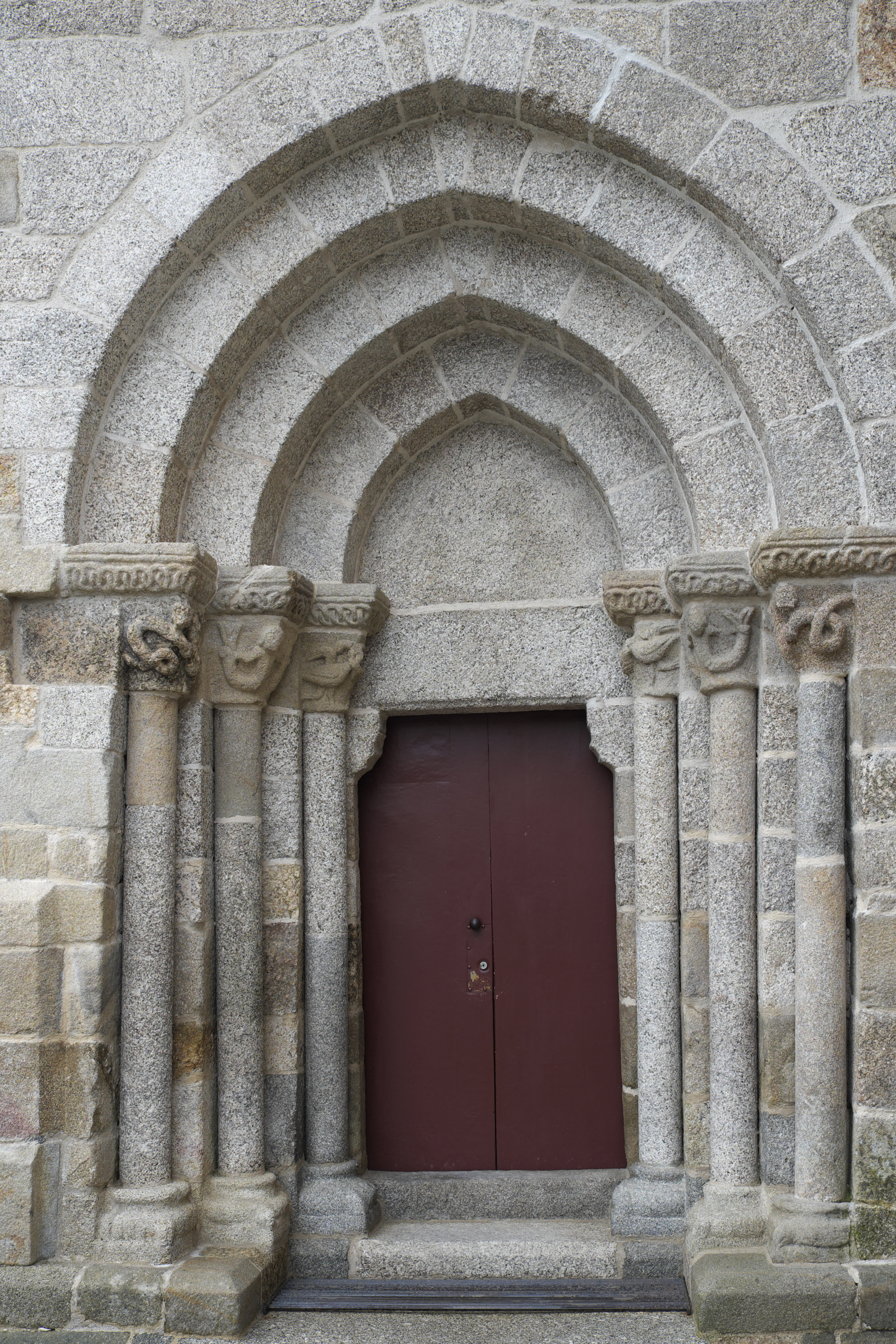 Ehemalige Benediktinerklosterkirche São Salvador in Travanca (Amarante) im Distrikt Porto in Nordportugal, Nordportal